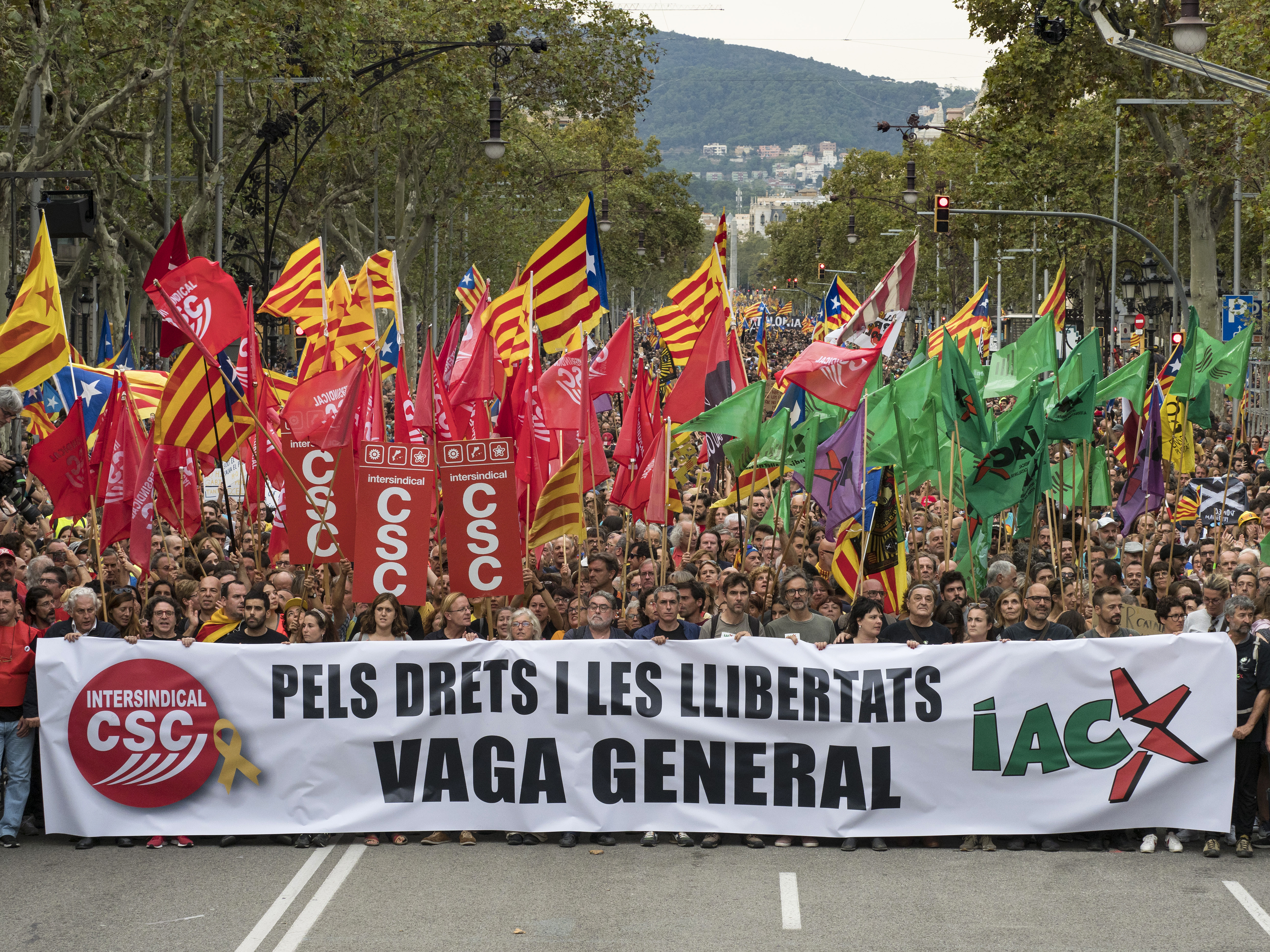 18 octubre de 2019 Aturada de país "Pels drets i les llibertats" Vaga general. ©Dani Codina/Òmnium